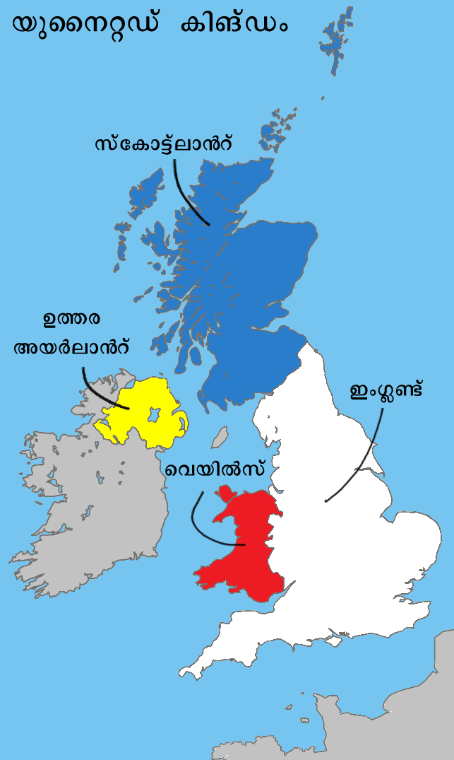 യുനൈറ്റഡ് കിങ്ഡത്തിലെ അംഗരാജ്യങ്ങൾ